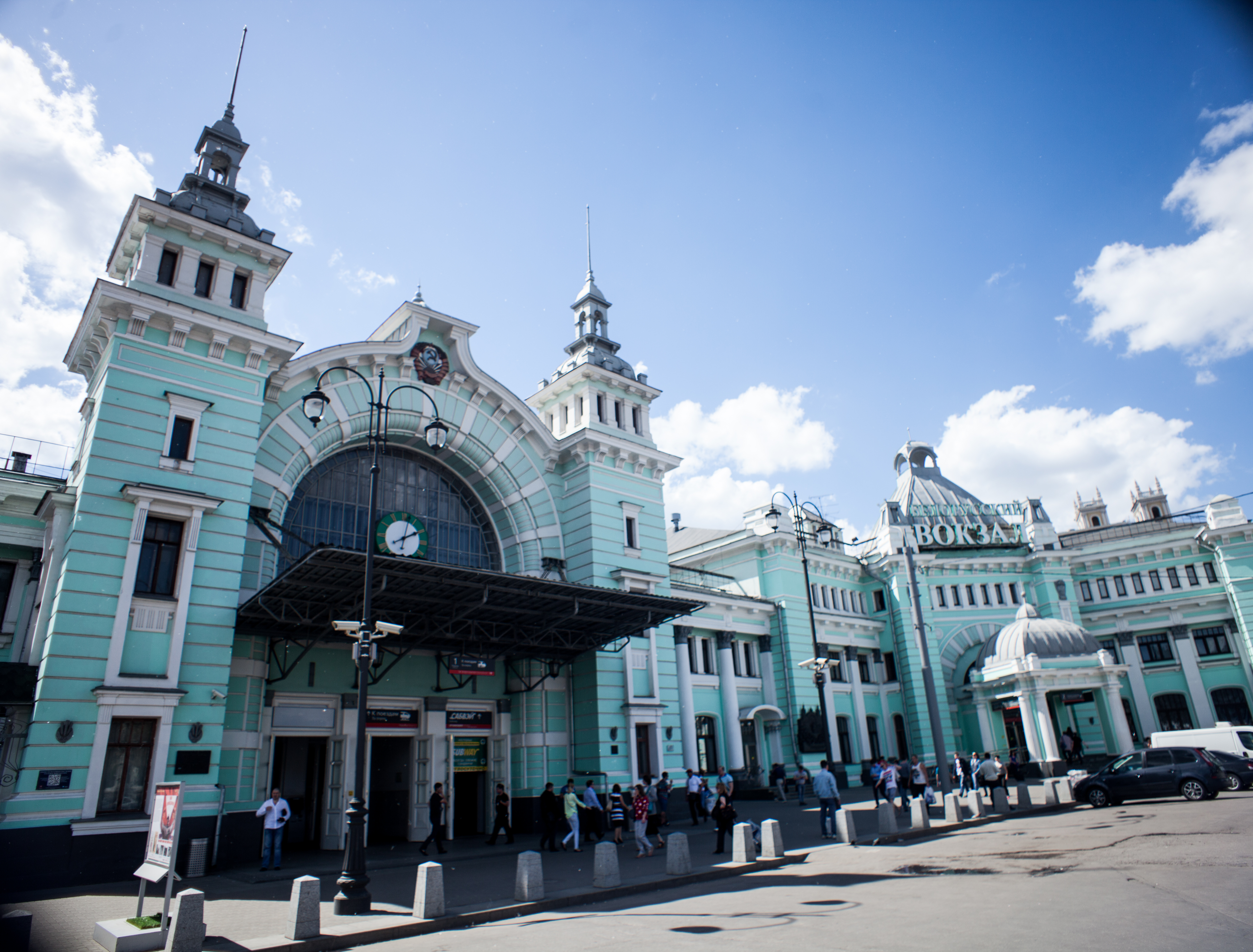 Белорусский вокзал